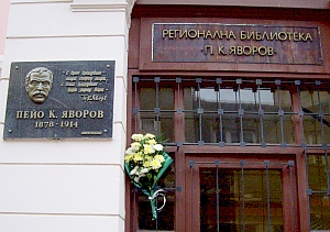 Регионална библиотека "Пейо Яворов" - Бургас